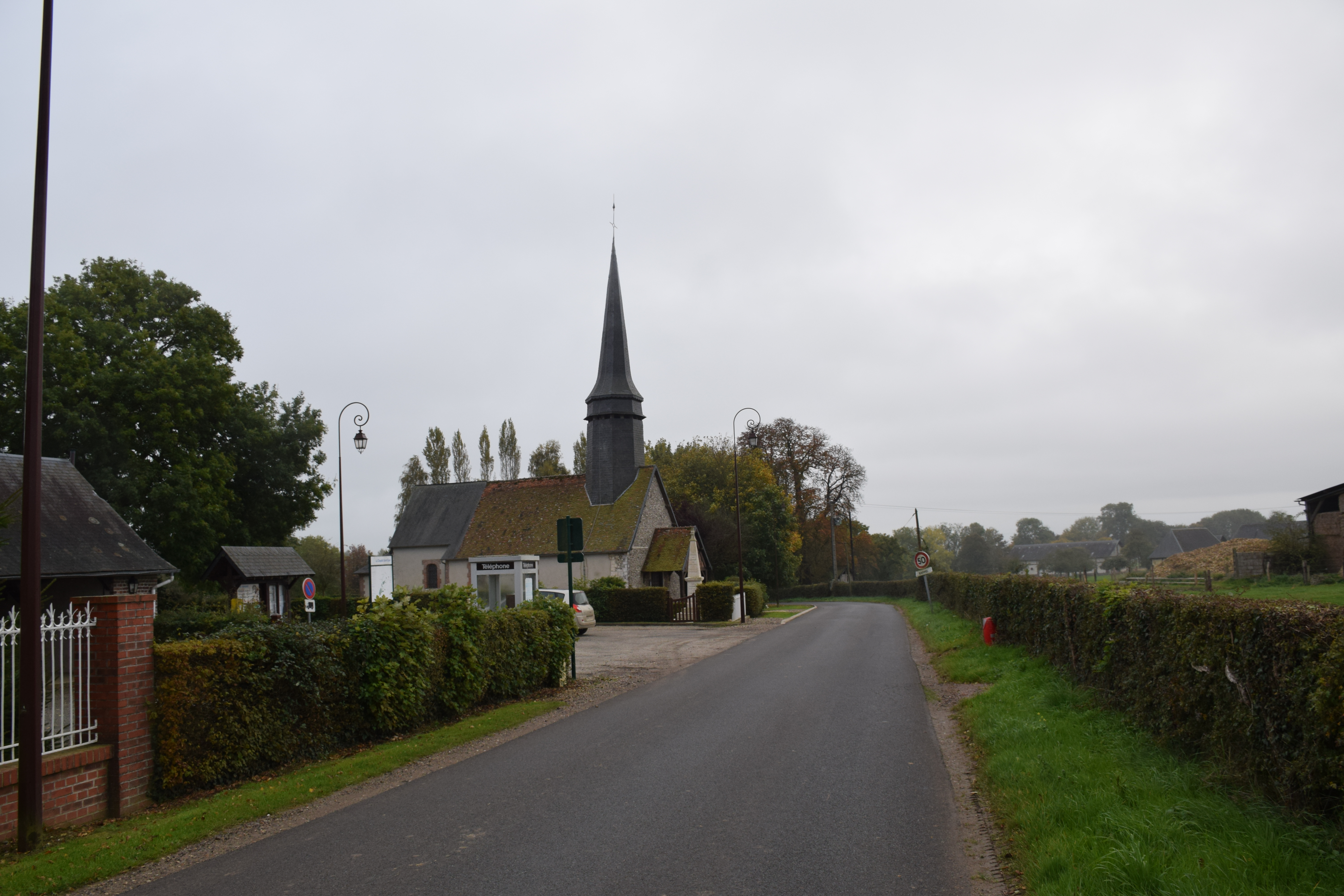 Eglise